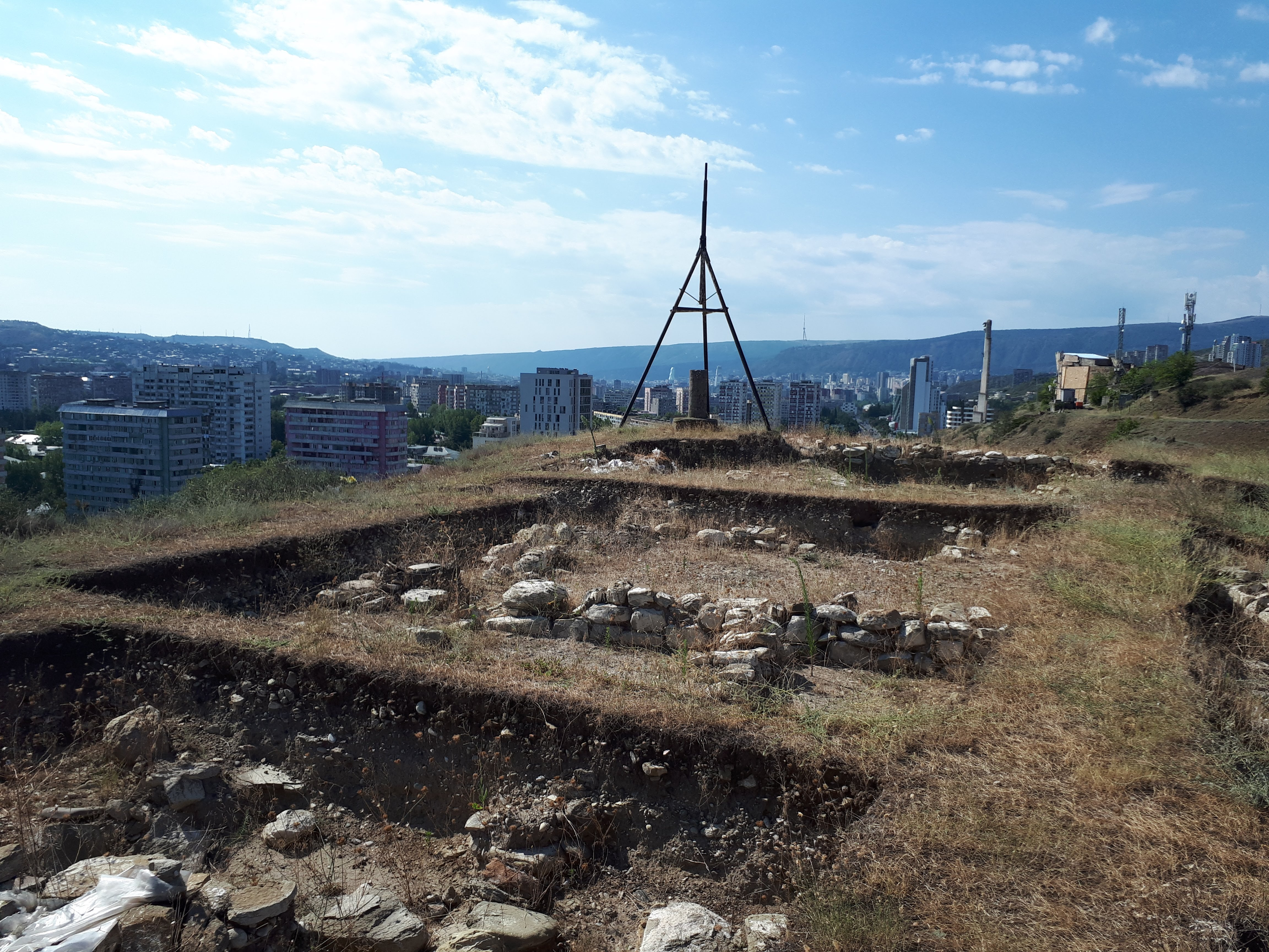 Treligorebi archaeological site, Tbilisi, Georgia